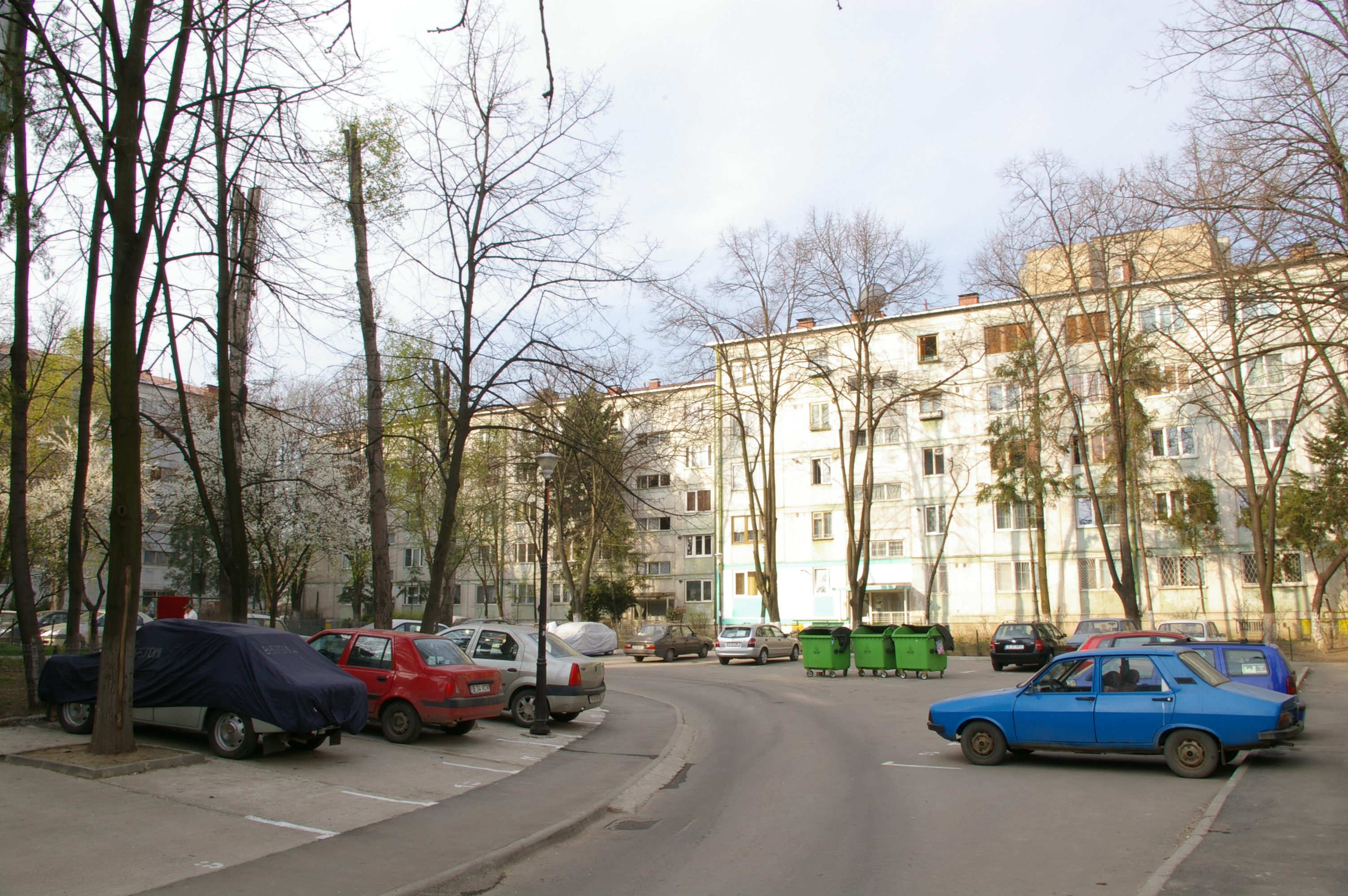 Bucuresti_Balta_Alba_Buildings